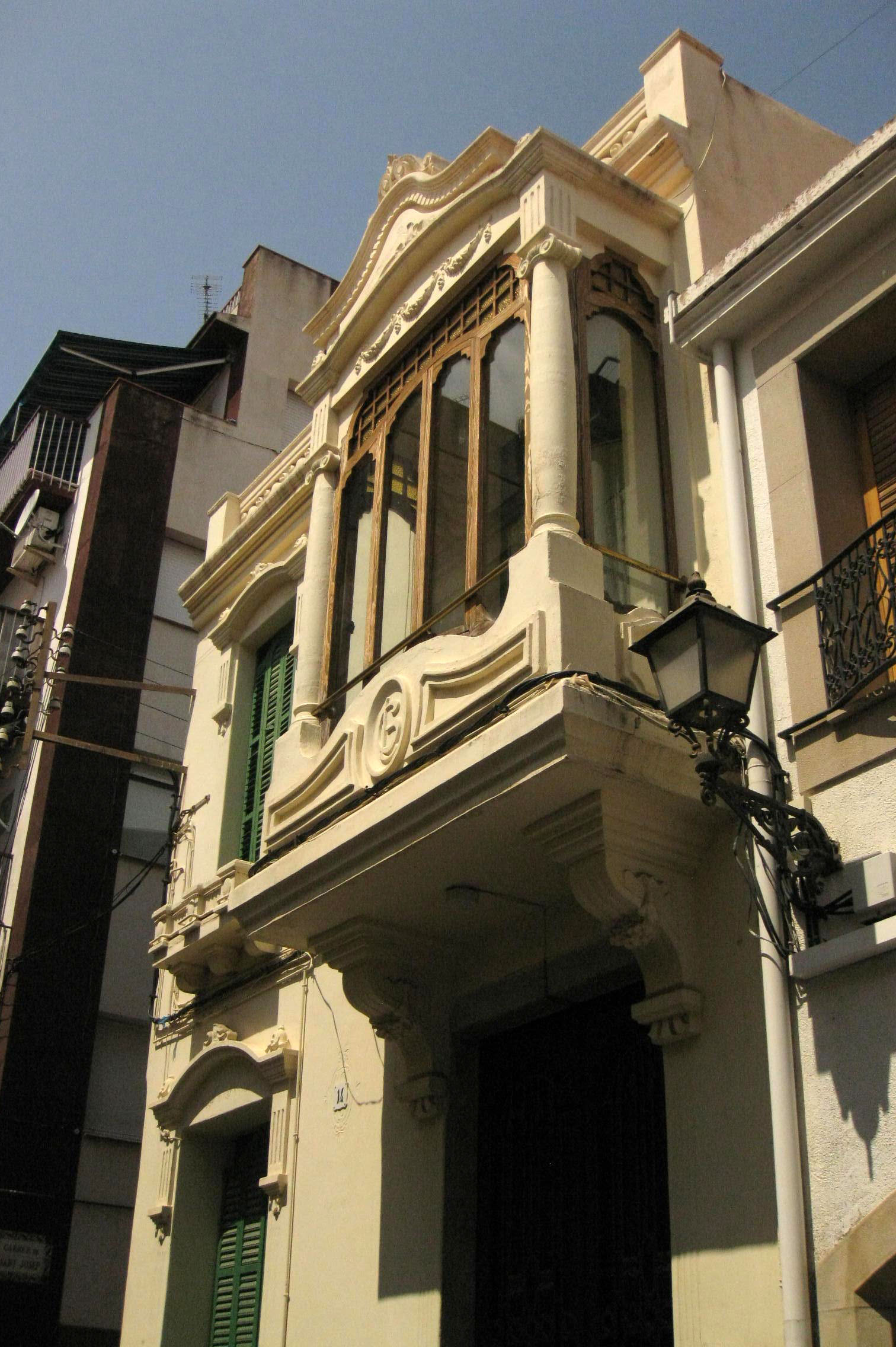 Casa al carrer de la Torre, 14 (Arenys de Mar)